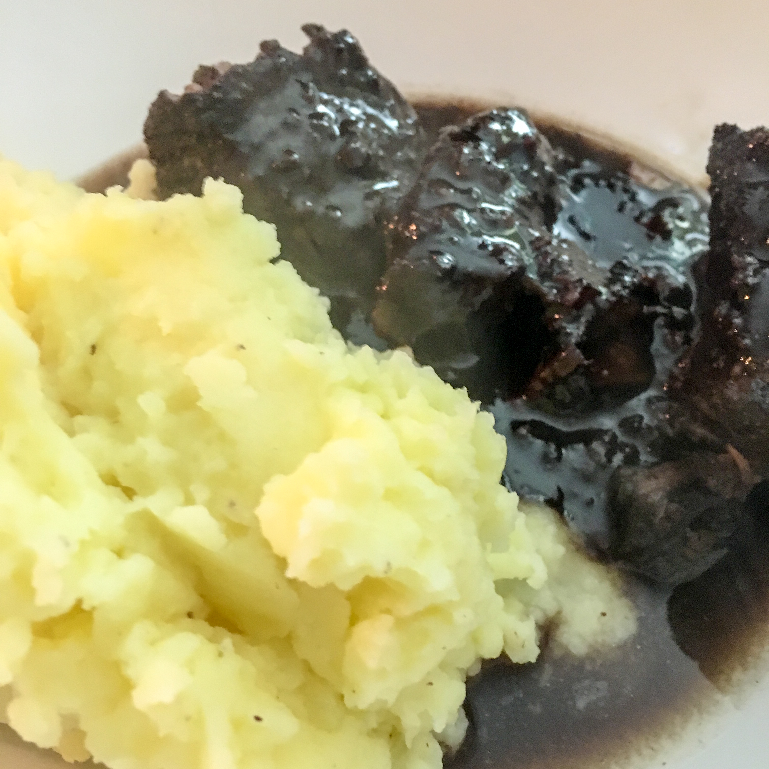 Pepposo Notturno, langsam in Rotwein geschmorte Rinderwade